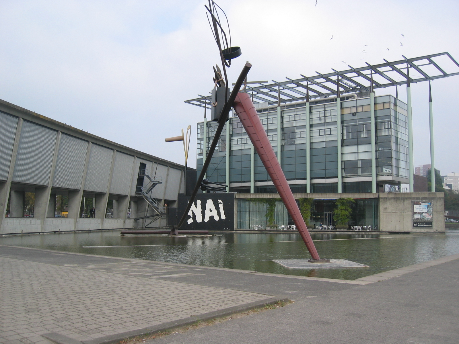 'Eigen werk'. Gebouw NAi te Rotterdam. 14-10-2006